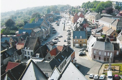 vue panoramique de la Place de Cassel